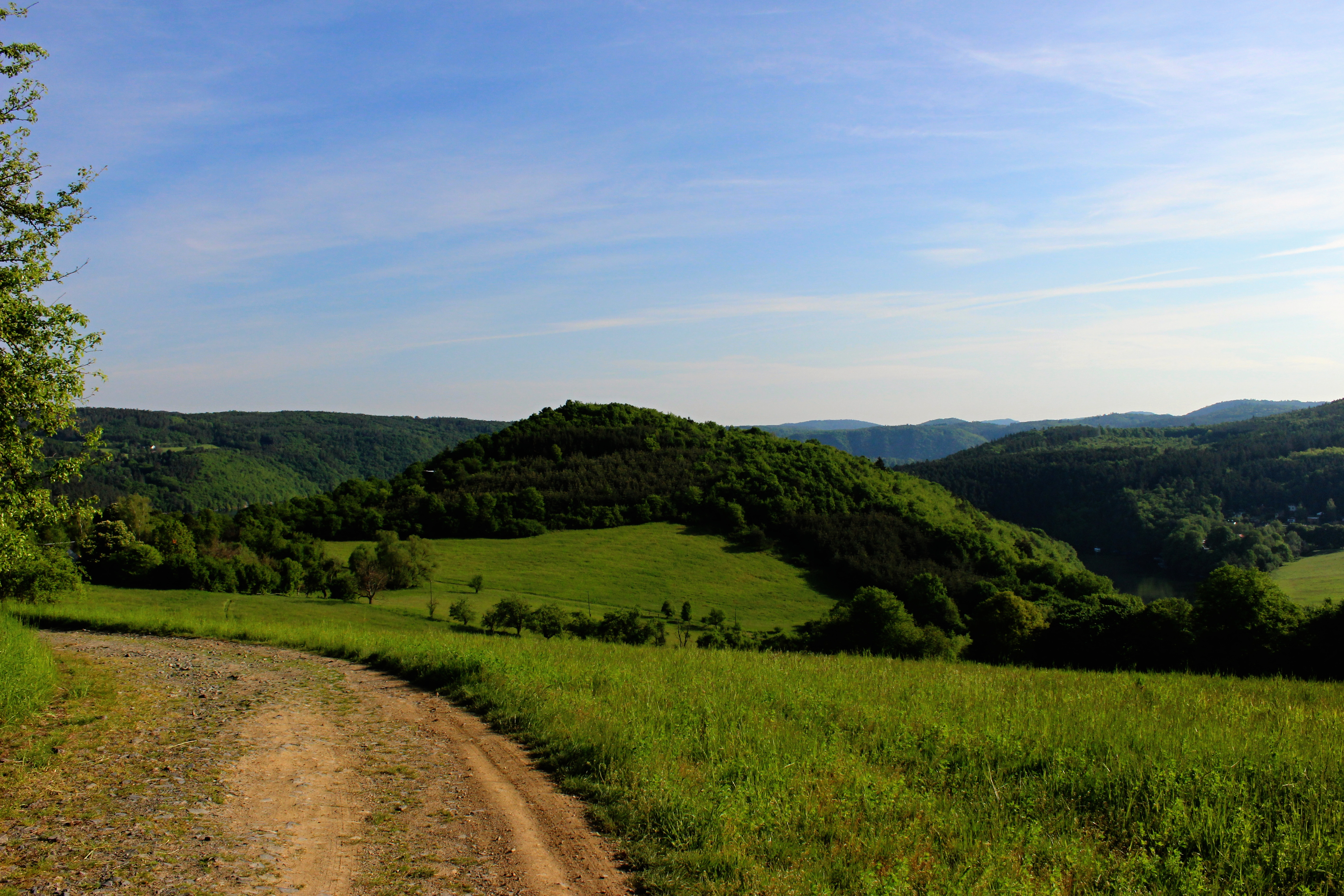 Vycházka po stopách keltů